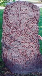 Upplands runinskrifter 489, universitetsparken Uppsala Handen som skymtar tillhör en femåring. Foto juli 2003, OlofE - OlofE 29 juli 2003 kl.22.31 (CEST) 29 juli 2003 kl.22.28 OlofE 161x292 (15229 bytes) (Upplands runinskrifter 489, universitetsparken Uppsala)